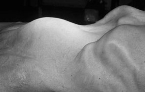 Пулзације предњег зида трбуха изазване анеуризмом трбушне аорте. Аутор др М.Димић Ниш 2009.